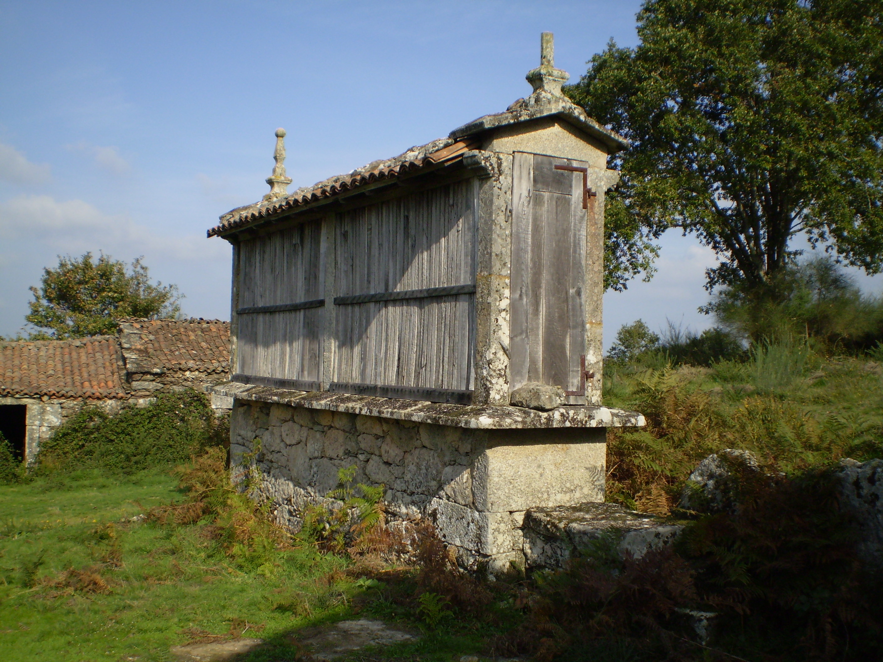 Hórreo de Ourás (Antas de Ulla)